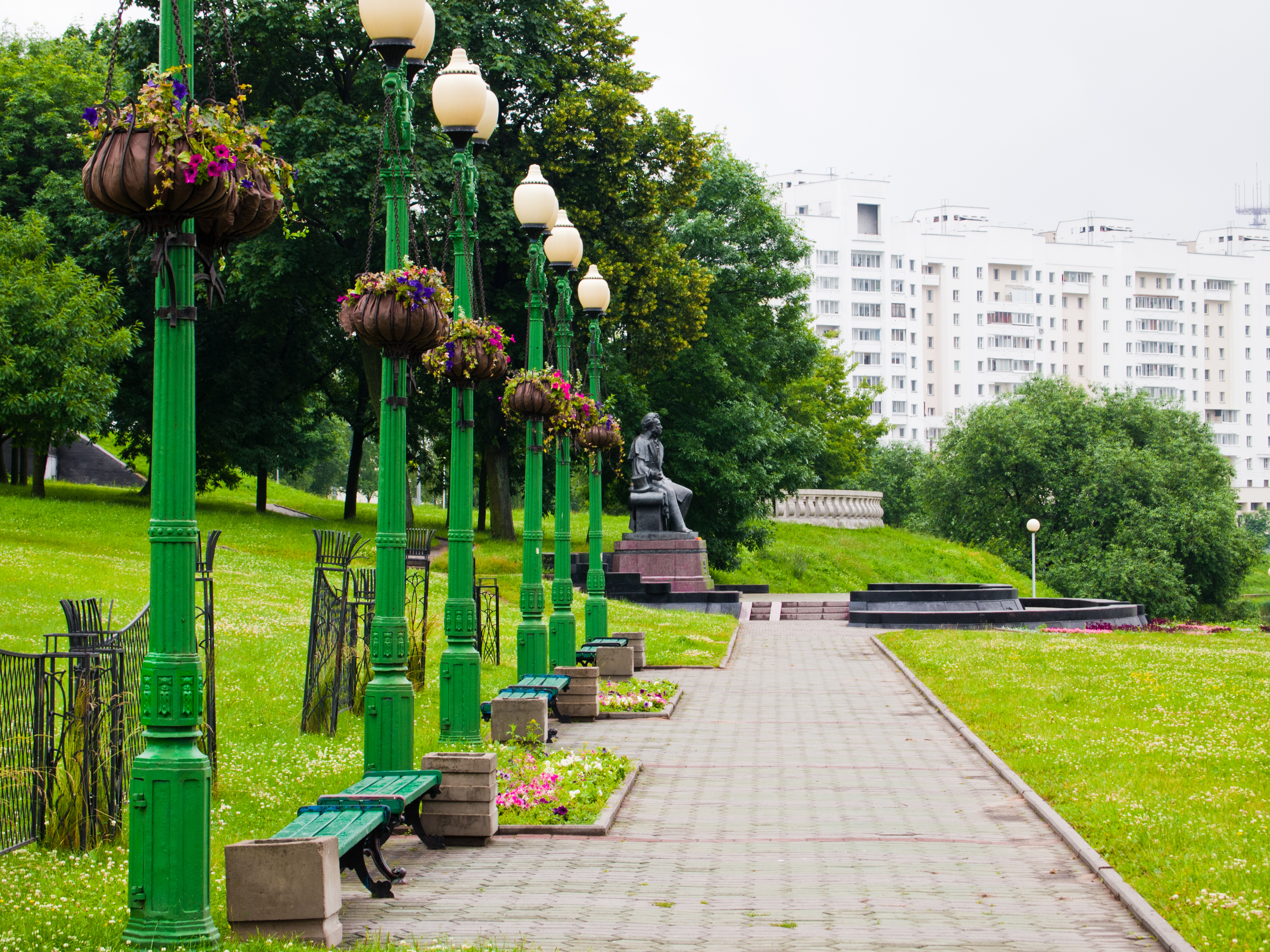 Minsk - Weg zum Denkmal für Alexander Puschkin